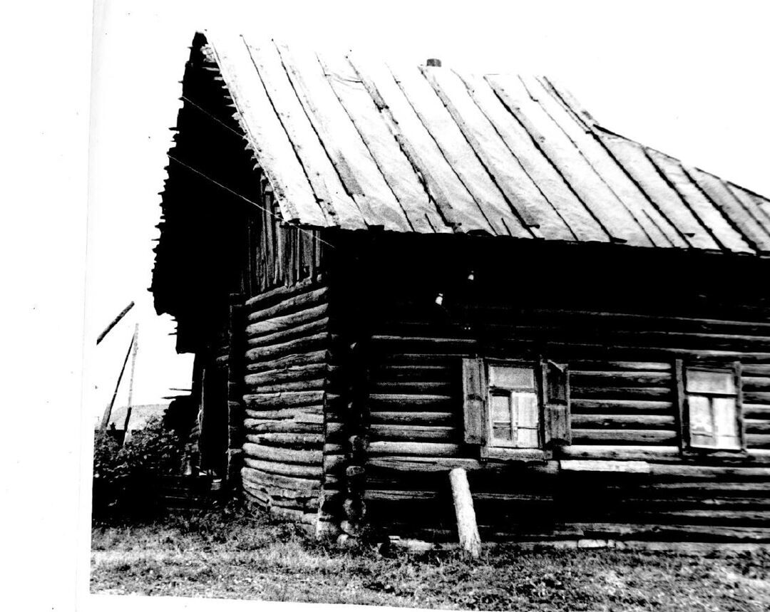 Изба М.М. Баринова